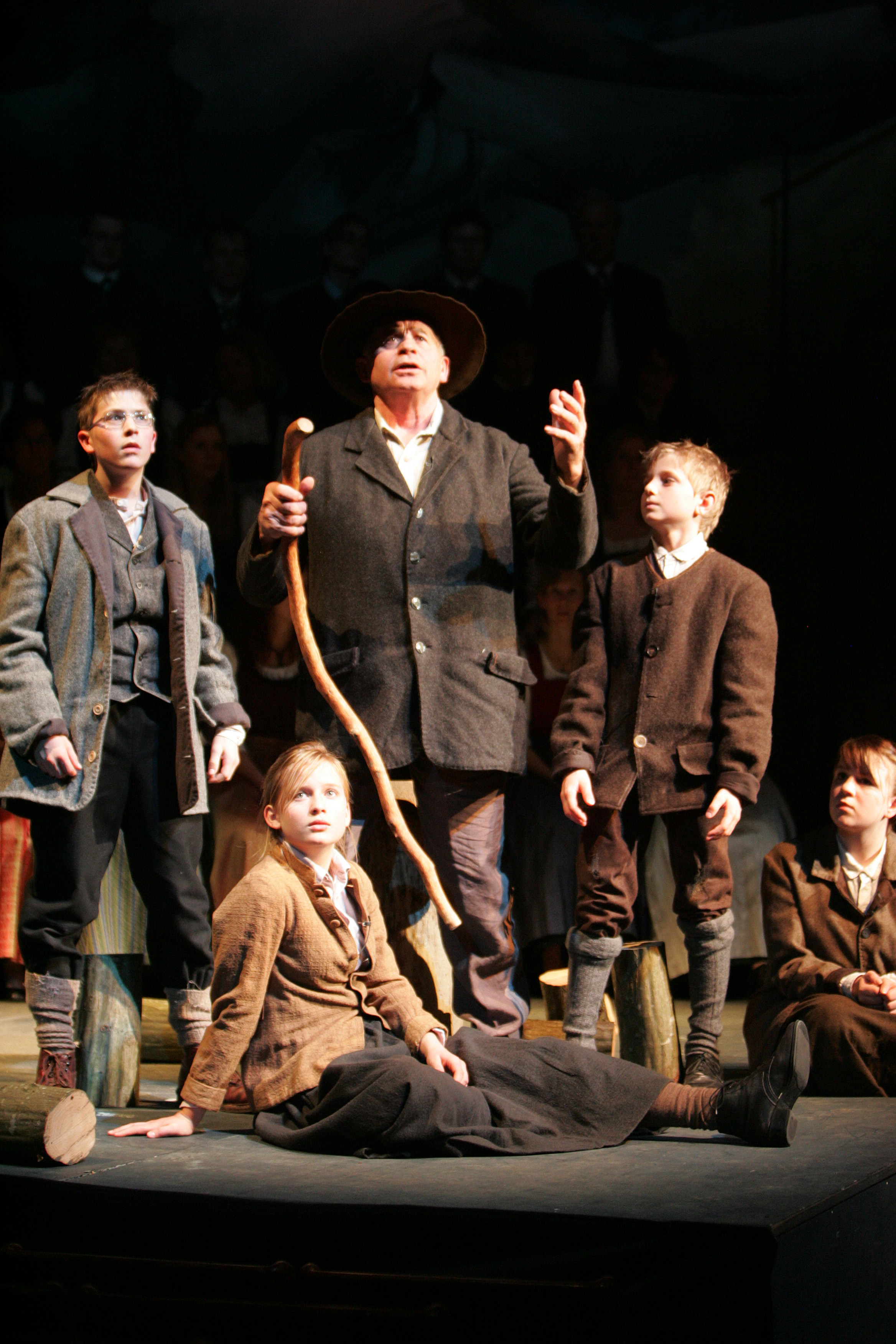 Das Salzburger Adventsingen im Großen Festspielhaus